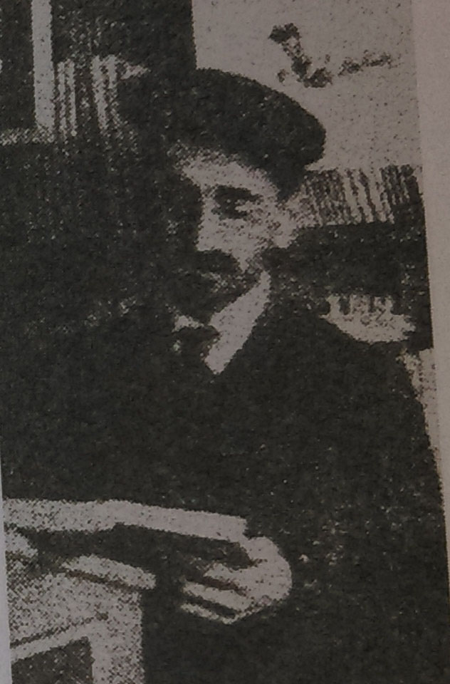 Светислав Б. Цвијановић